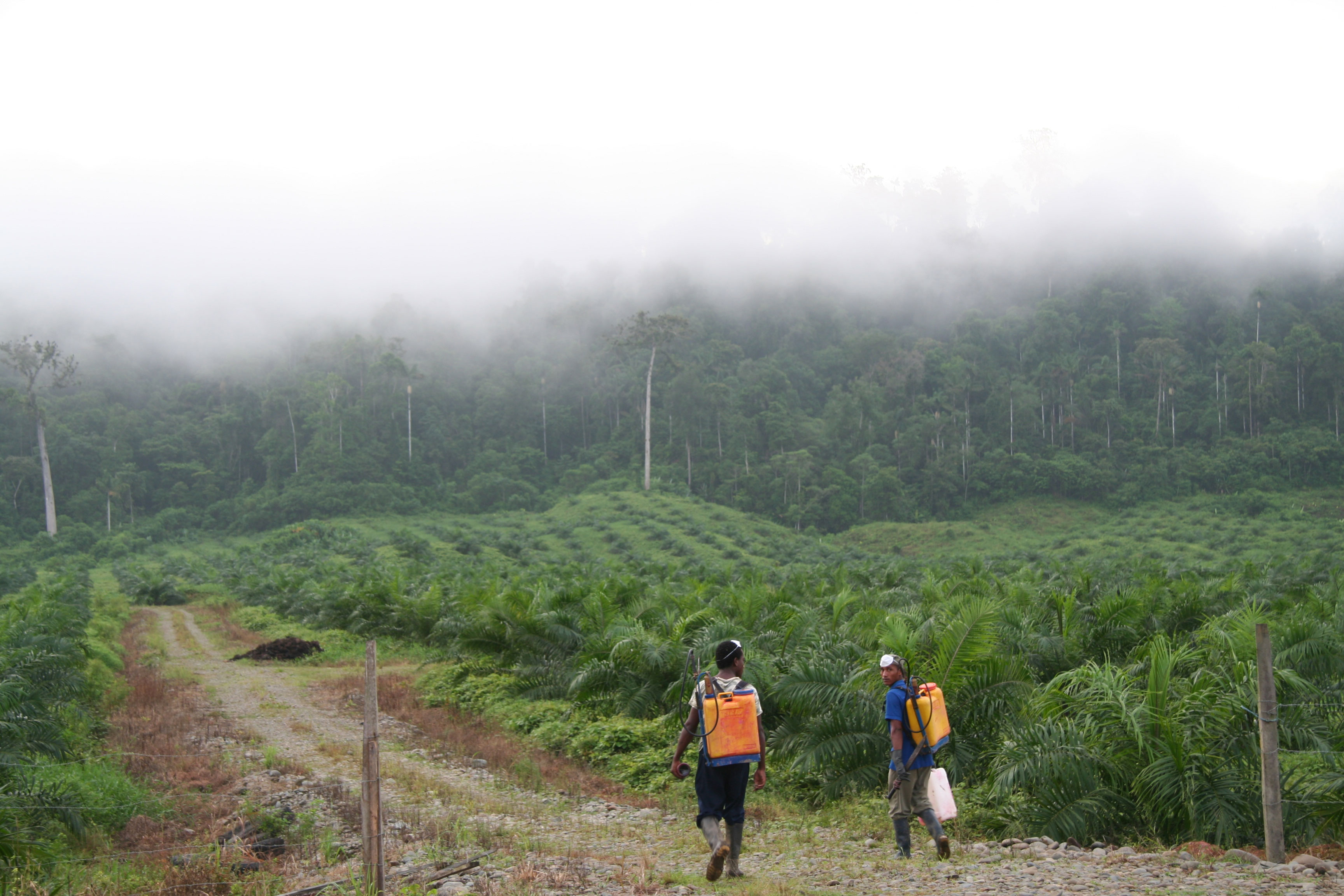 Pestizideinsatz auf einer Palmölplantage in Ecuador